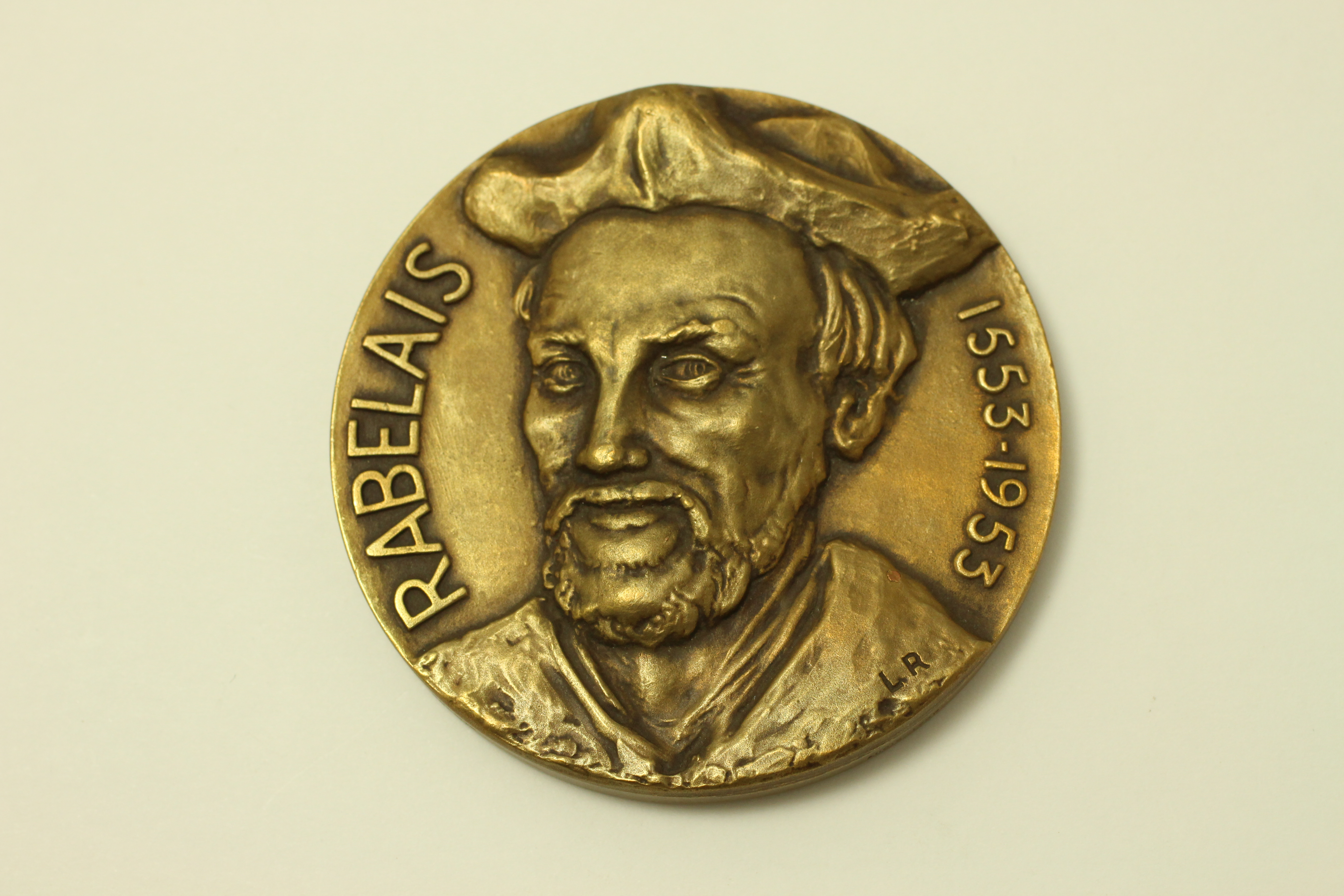 Médaille à l'effigie de François Rabelais ; bronze , 1953 ; avers ; Propriété des Hospices civils de Lyon